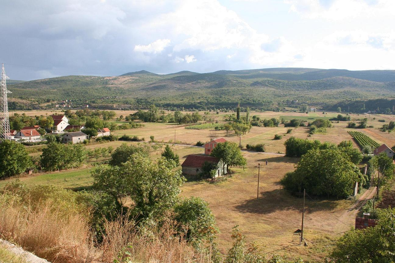 Blick auf das Petrovo Polje in Kroatien bei Driniš in der Ortschaft Gradac.